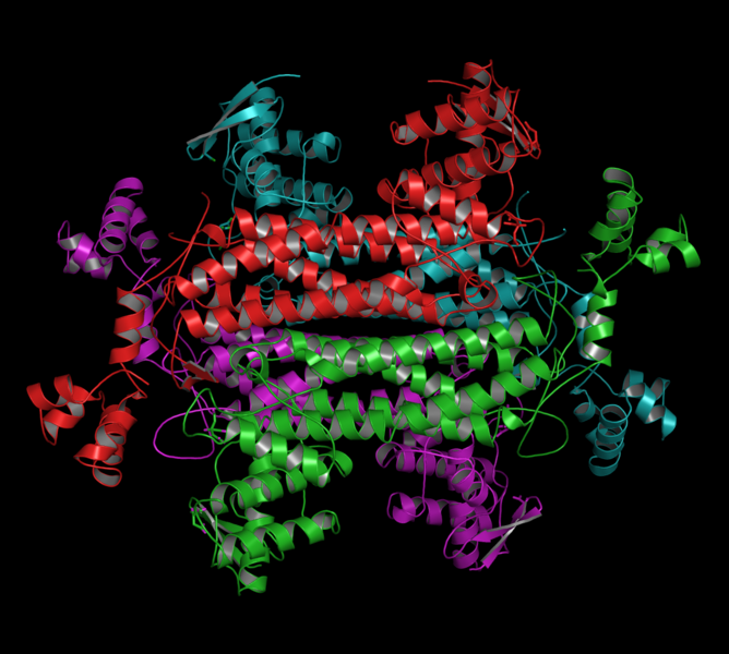 Summary Bildbeschreibung: Quartärstruktur der Fumarase C aus Escherichia coli. Quelle: selbst erstellt. Fotograf/Zeichner: Minutemen Datum: 16. Mai 2006 Sonstiges: Abbildung erstellt aus pdb 1FUO ( mit pymol 0.99 .